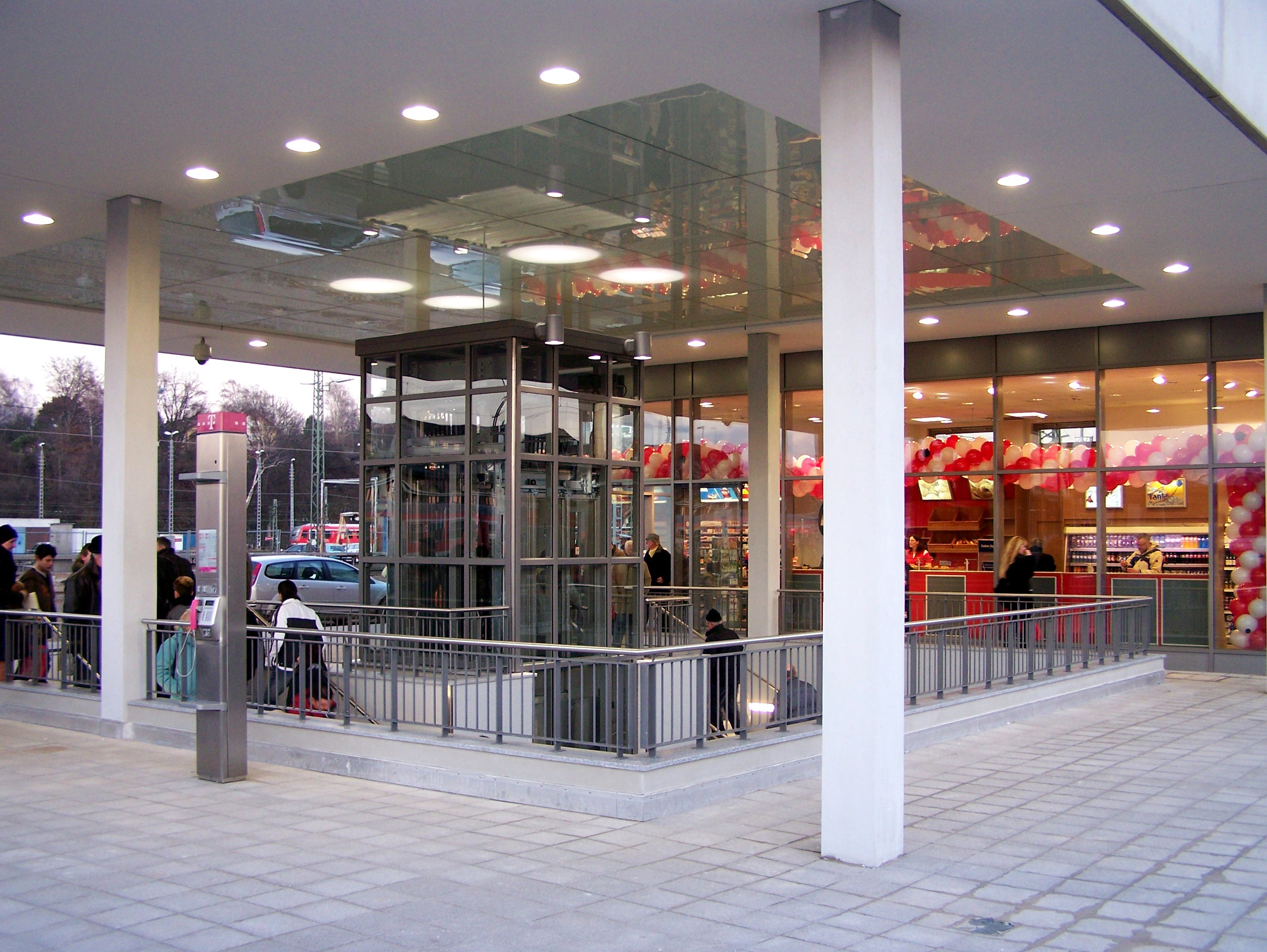 Nordzugang zum Hauptbahnhof Saarbrücken (unterirdisch)